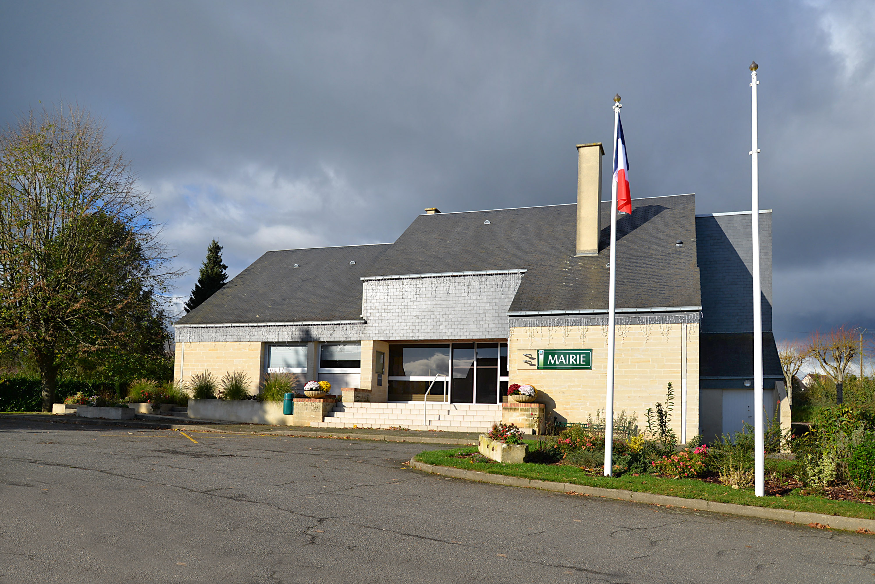 Grainville-sur-Odon (Calvados)